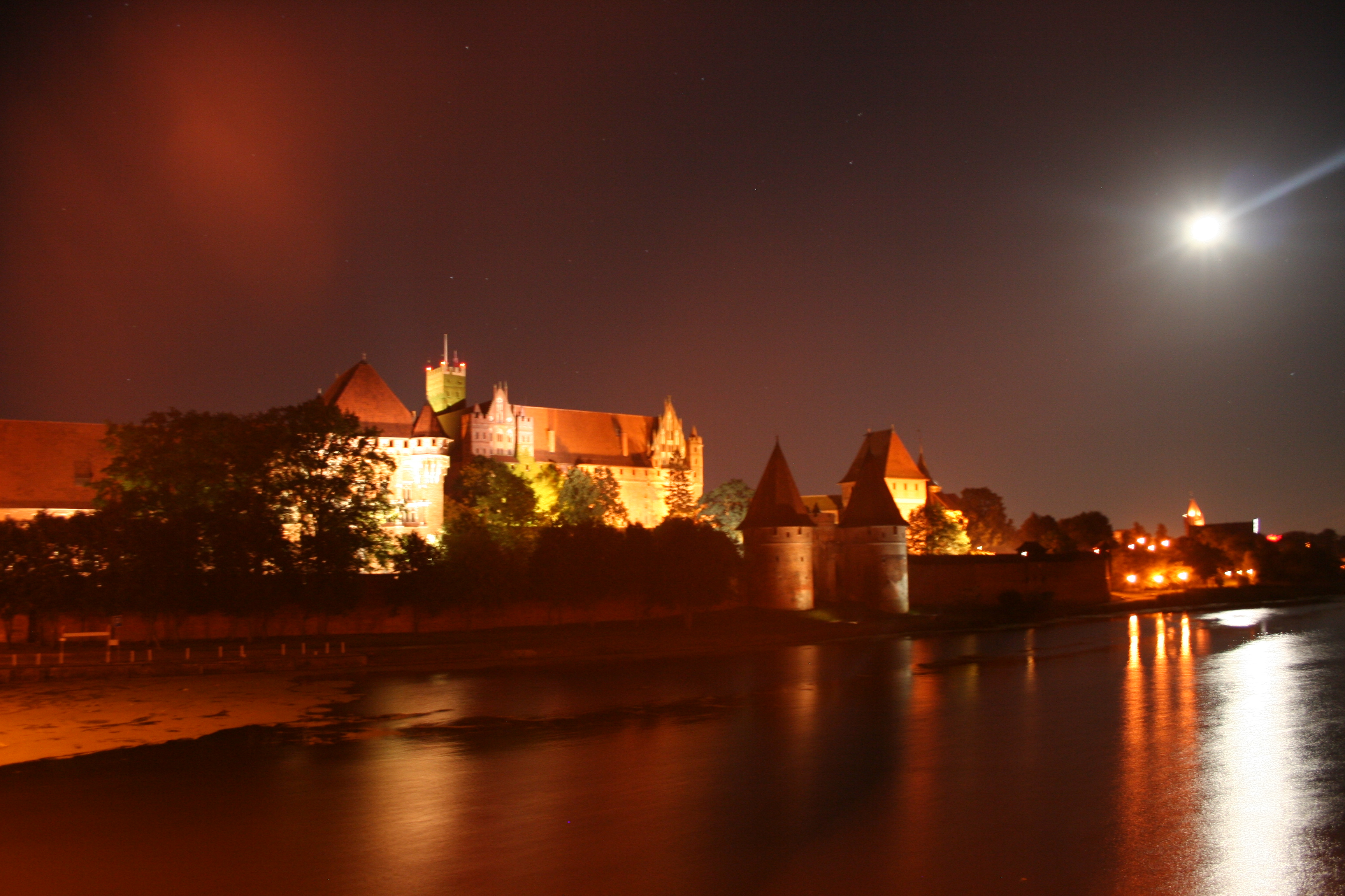 Malbork, zespół zamku krzyżackiego, XIII, XIX